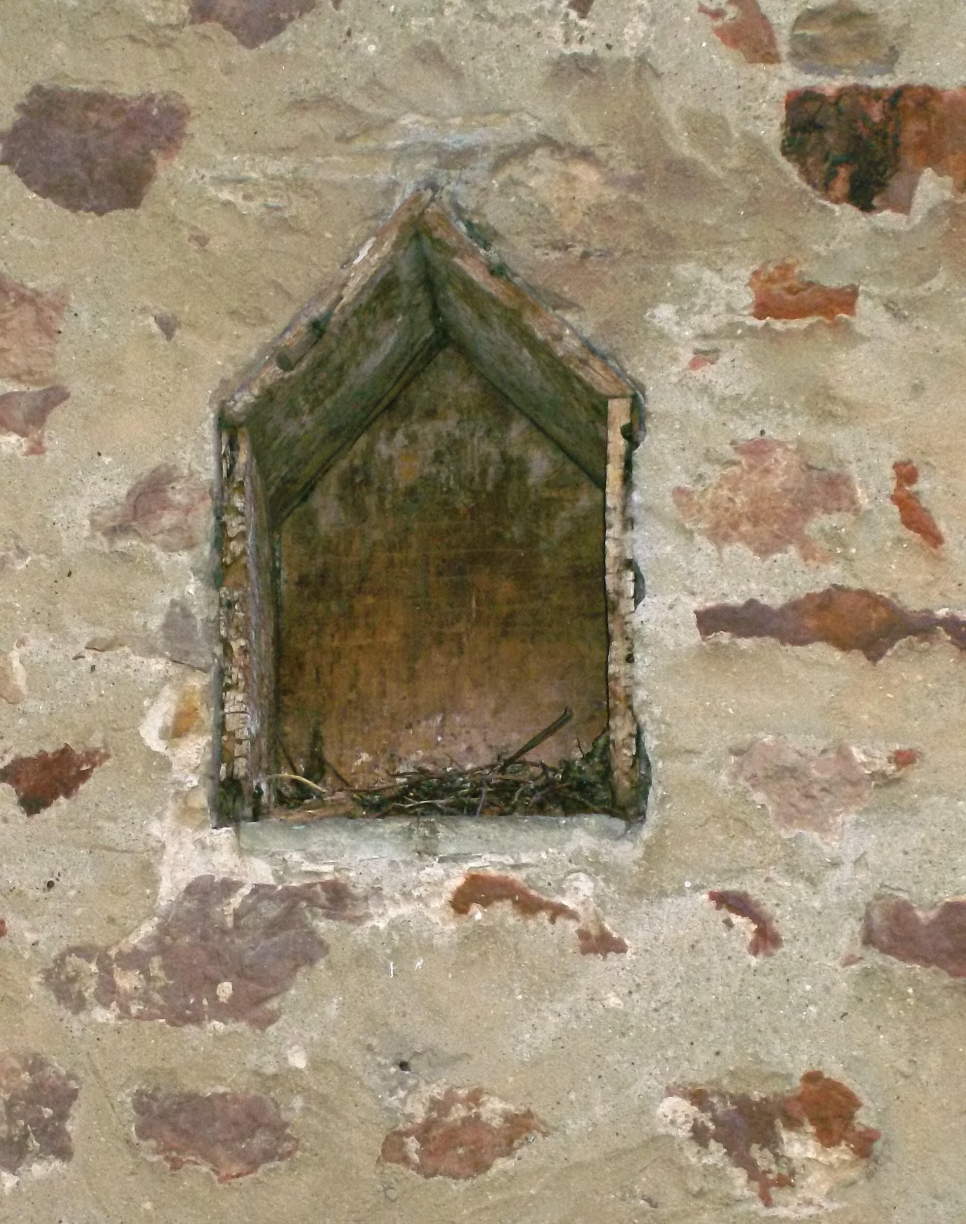 Schloss und Benediktinerabtei Iburg in Bad Iburg, Hagioskop der römisch-katholischen Klosterkirche des ehemaligen Benediktinerklosters und jetzigen Gemeindekirche St. Clemens (Bad Iburg)